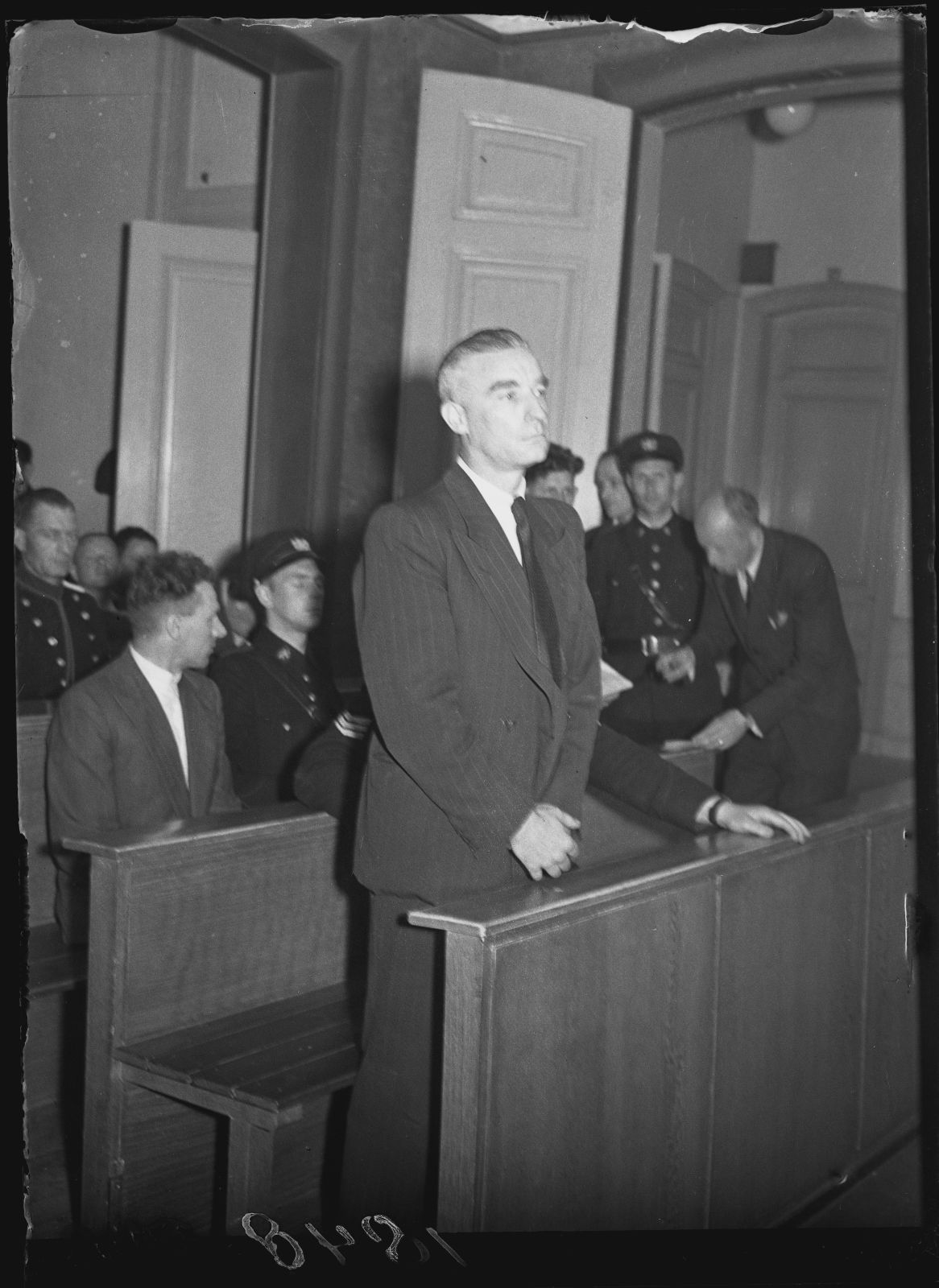 Verhuizer Abraham Puls, werkte mee aan het leeghalen van de woningen van Joden en andere gedeporteerden, voor het Bijzonder Gerechtshof, Amsterdam, 2 juni 1947 Foto Ben van Meerendonk / AHF, collectie IISG, Amsterdam